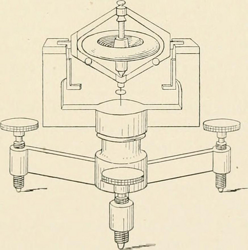 Ce croquis présente le barogyroscope, instrument inventé par le mathématicien belge Philippe Gilert en 1882.